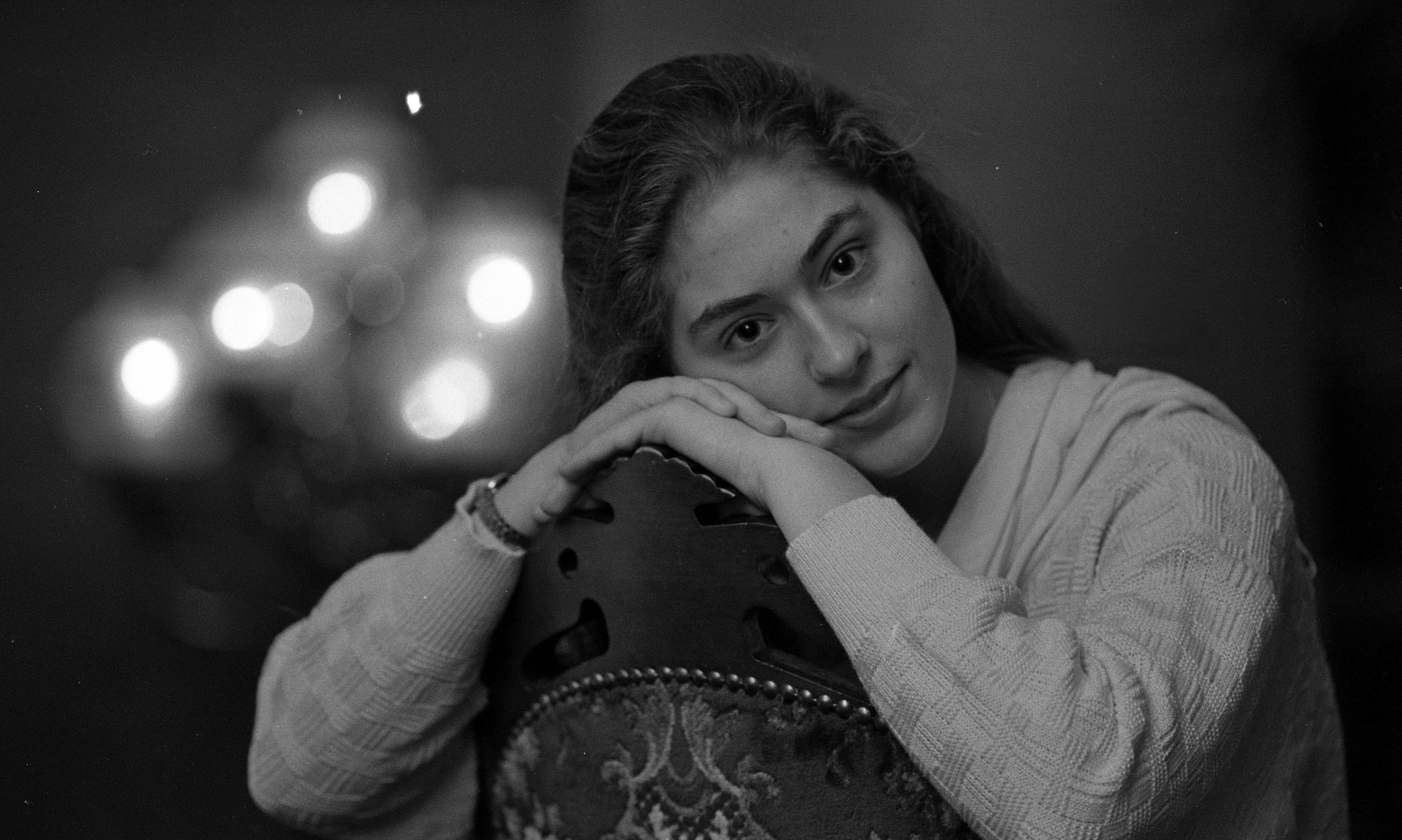 Sissel Kyrkjebø, 1986. Foto: Bo Mathisen. Arkivref.: PA-0797_U_13395_001_007